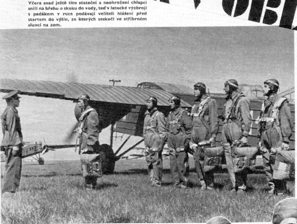 Z meziválečného Brna operovala československá těžká bombardovací letadla. Na snímku licenční Aero MB 200 (Marcel Bloch)